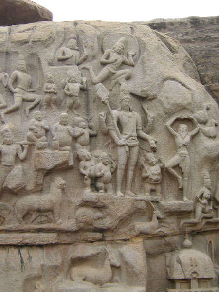 Shot by user Mayooranathan